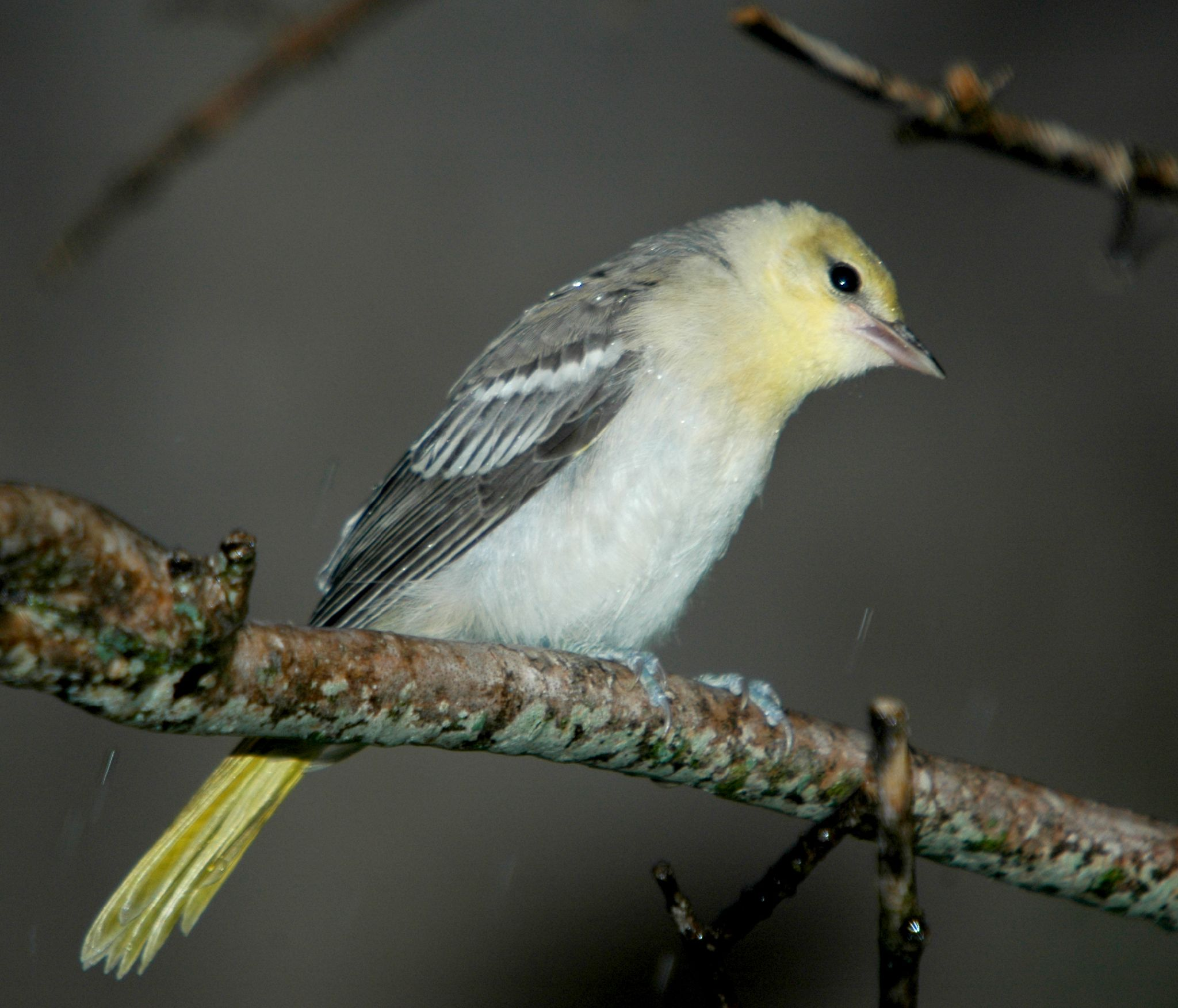 Bullock's Oriole (Icterus bullockii), Female